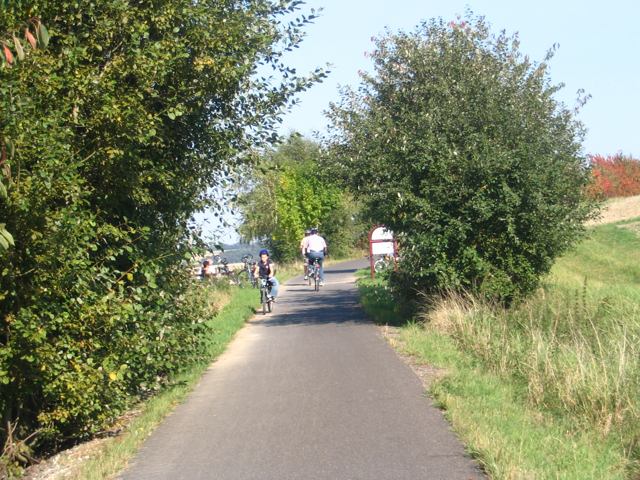 Schinderhannesradweg bei Gammelshausen, Hunsrück